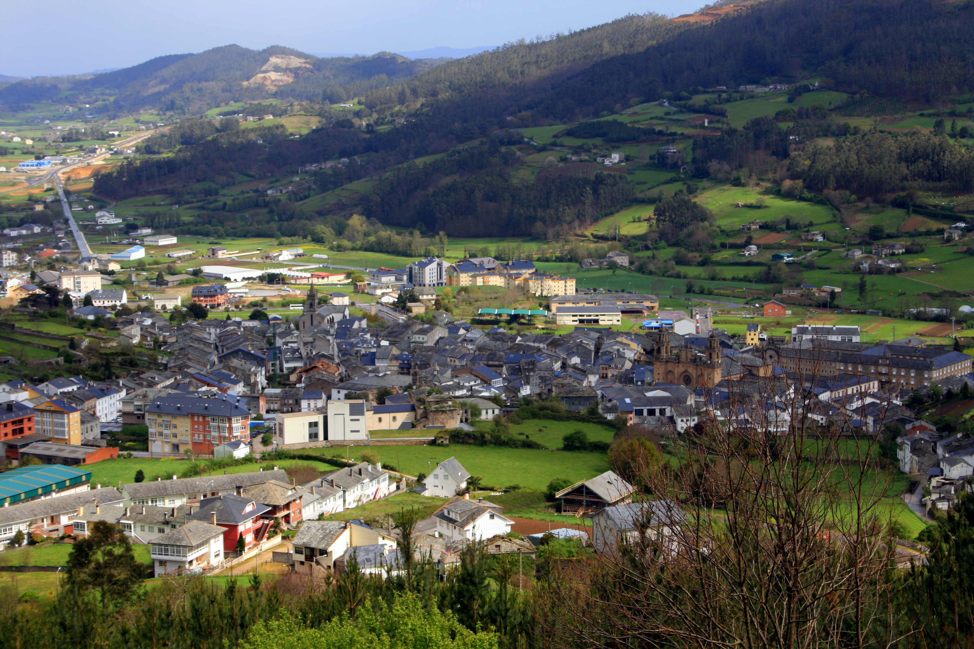 Vista panorámica de Mondoñedo Licensing Categoría:Imaxes de Mondoñedo